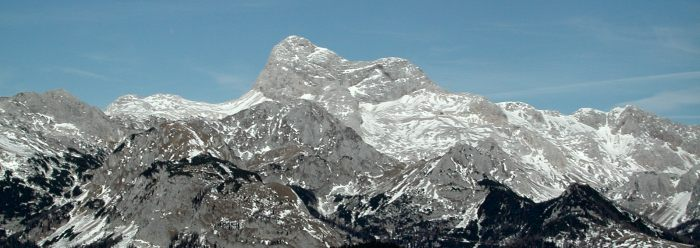 Triglav - južno pobočje; pogled z Vogla (nad Bohinjskim jezerom).